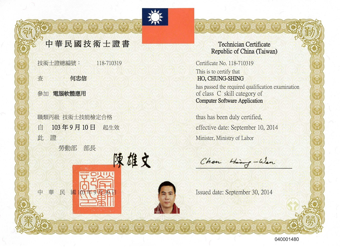 中華民國技術士證書，技術士證總編號118-710319，電腦軟體應用職類丙級技術士技能檢定合格。